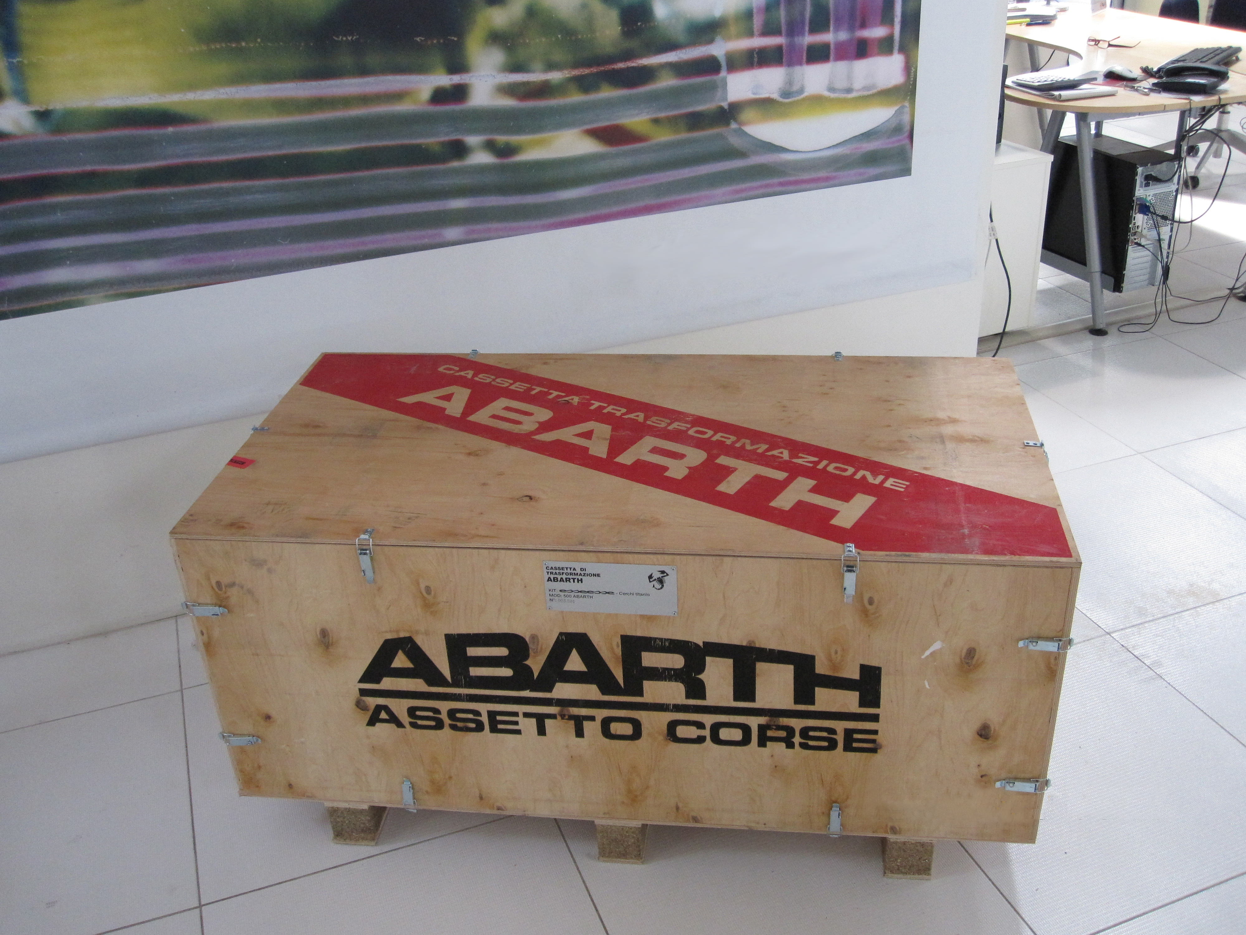 kit di trasformazione potenziamento EsseEsse Abarth